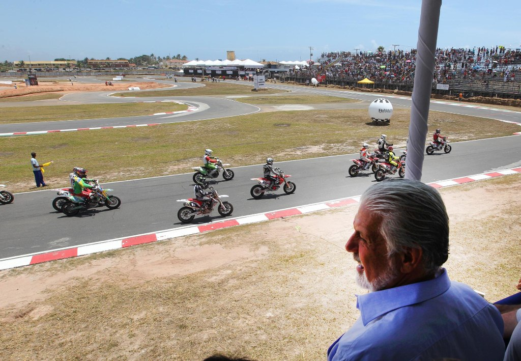 Governador Jaques Wagner assiste ao desafio Supermoto no Kartodromo de Lauro de Freitas. Foto Manu Dias/AGECOM